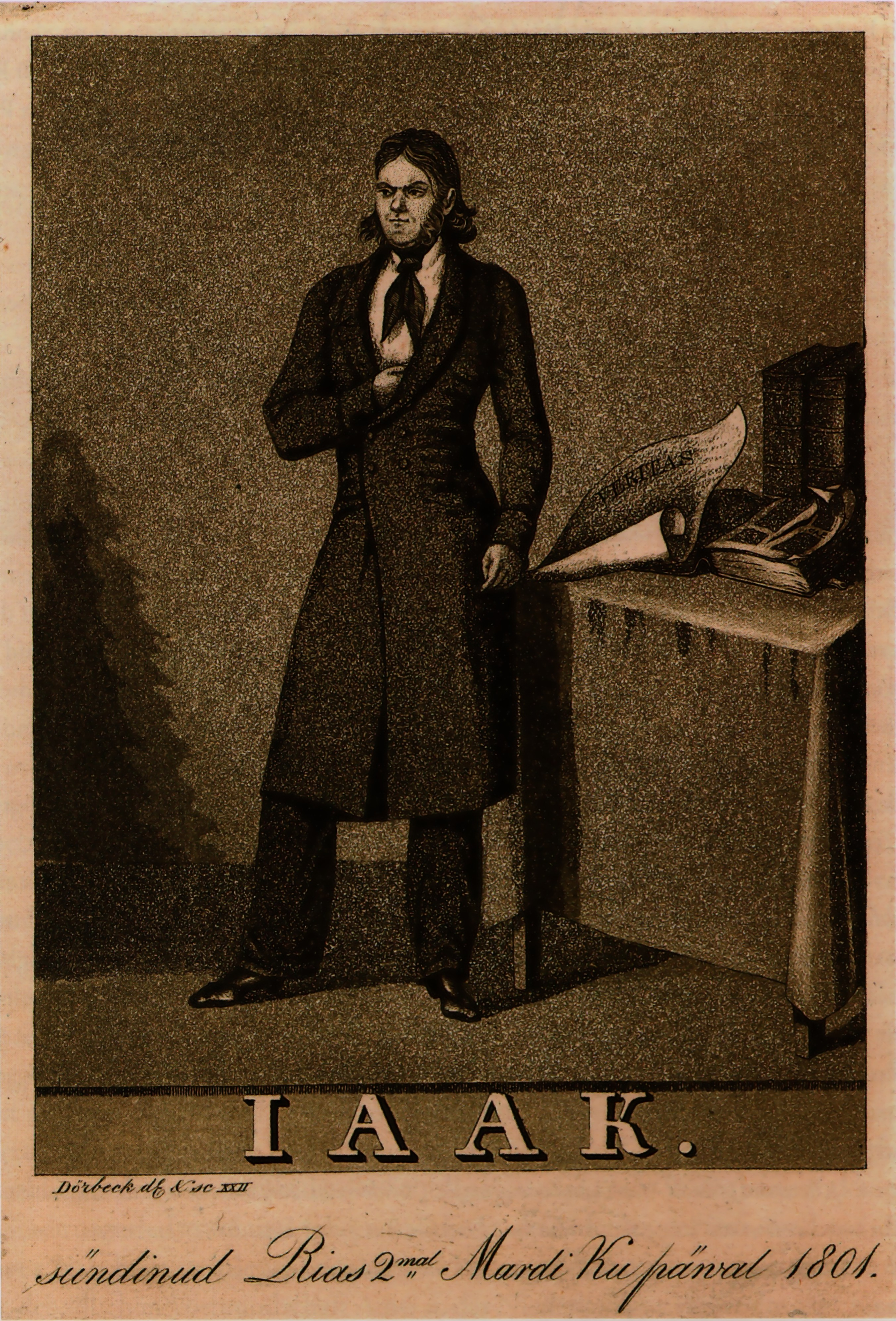 Brotze's Beschreibung: ANMERKUNG ZU DEM GEGENÜBERSTEHENDEN LITOGRAPHISCHEN DRUCKE. Der hier vorgestellte Jüngling hieß eigentlich Christian Jakob Petersohn, und war der Sohn des Kirchenknechts der Schwedischen und Ehstl. Gemeine bei der Kronskirche zu S. Jakob in Riga. Er schämte sich nicht ein Ehste zu seyn, sondren wählte sich sogar den Namen Jacob Ehstn. Jaak, der unter seinem Bilde steht, zum Lieblings Namen in welchem das J eben so lautet, wie im Teutschen Jacob. Er war 1801 d 2 Mart geb. studirte in Dorpat, und starb Anno 1822 d 23 Julij. Die Natur hatte ihn mit vortrefflichen Gaben ausgerüstet, wie in seiner Biographie in den Rig. Stadtblättern A 1822 p 297 sehr richtig gesagt ist. Auch hat er verschiedenes geschrieben. Sprachen waren sein Lieblings Studium. vid. ibidem p. 366 auch die Litterärischen Anzeigen von 1821 p 24